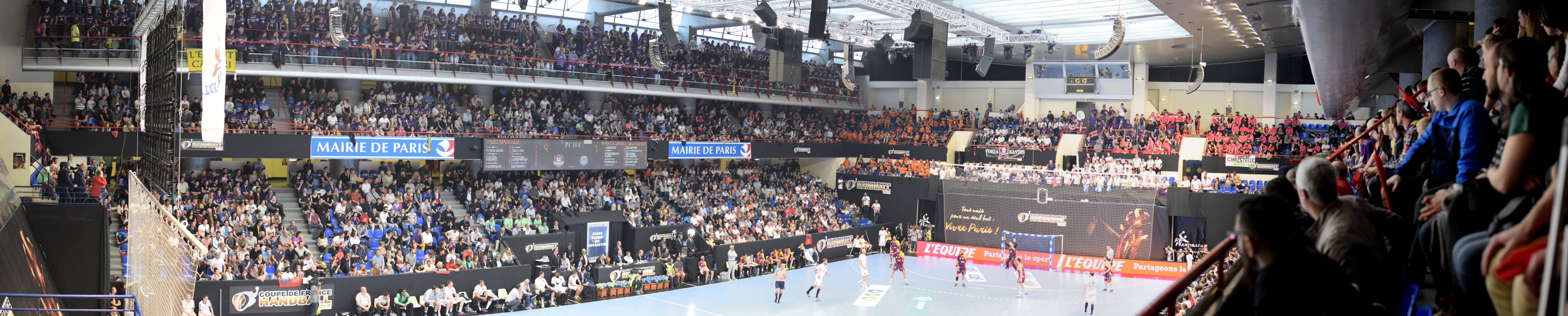 Vue panoramique lors de la finale de coupe de France de handball masculin, au stade Pierre de Coubertin à Paris 16e, le 26 avril 2015.